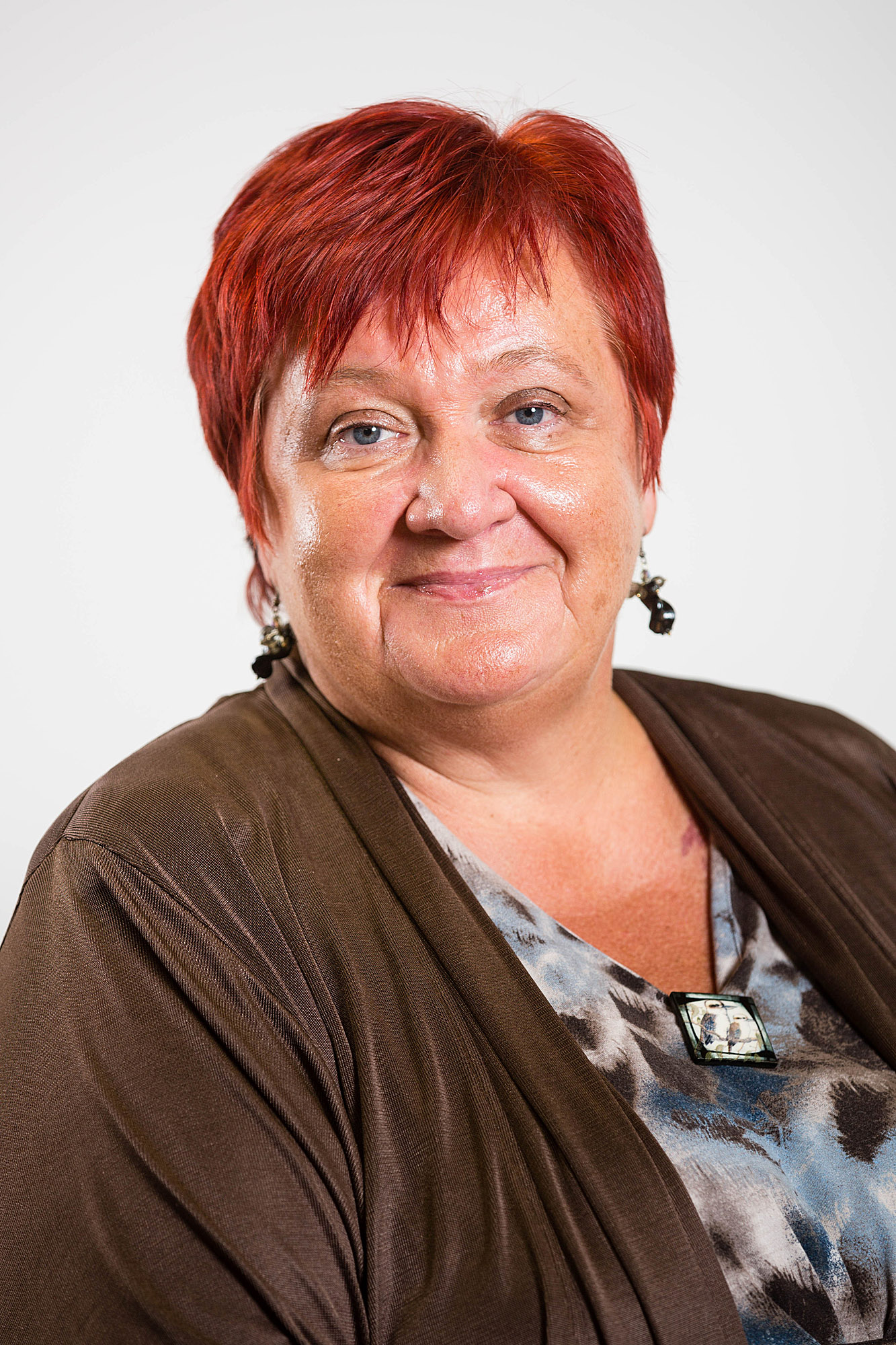 Piret Kärtner 2017. aastal